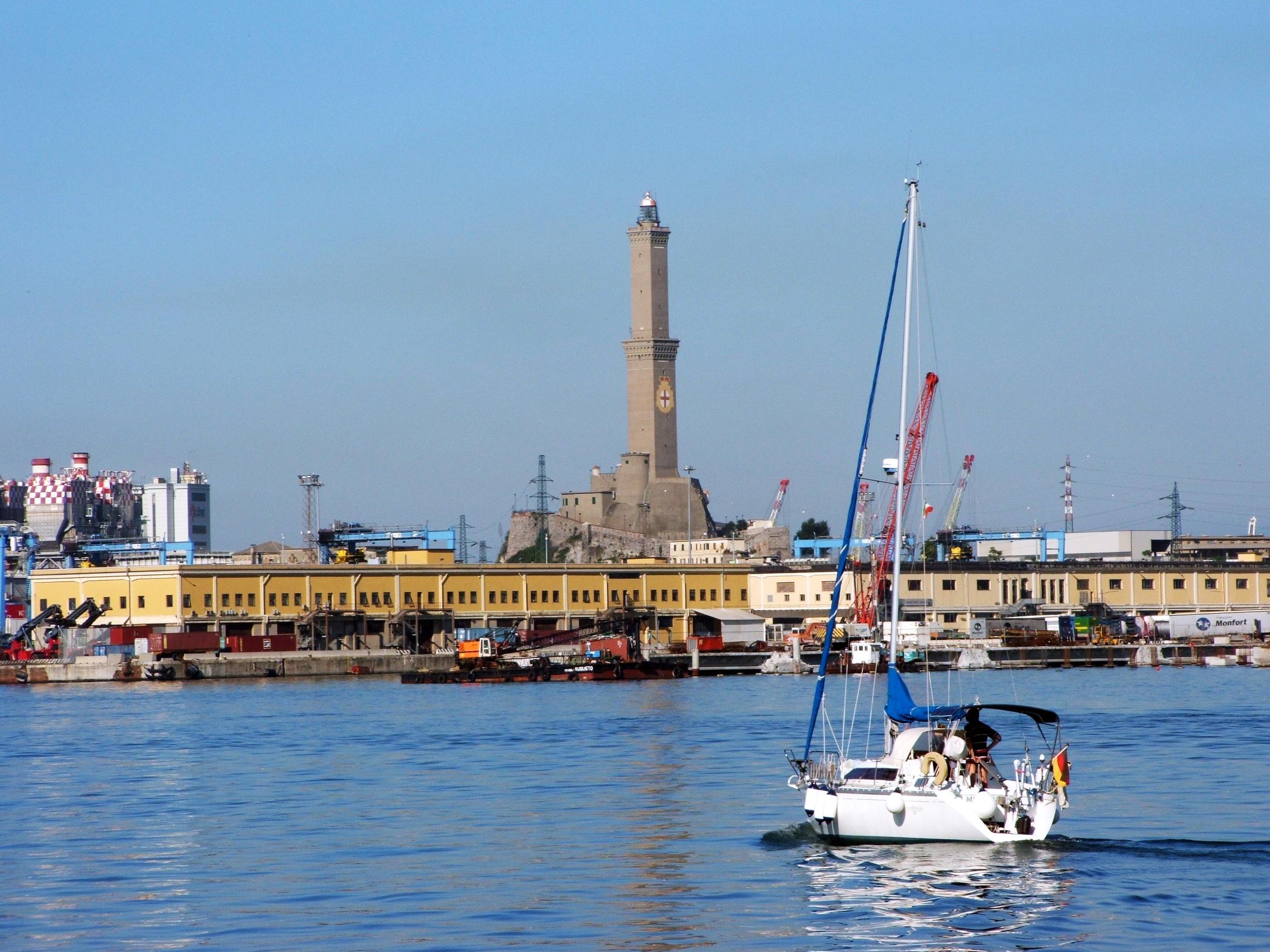 Immagine dal porto antico di Genova, Italia. Sullo sfondo la torre della Lanterna di Genova